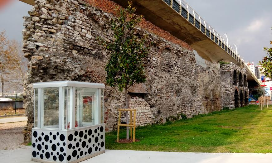 Galata Surları'nın kalıntısı